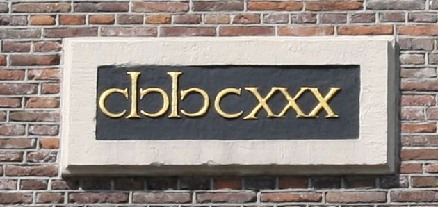 das Baujahre in römischer Zahlschrift an der Westerkerk-Kirche in Amsterdam